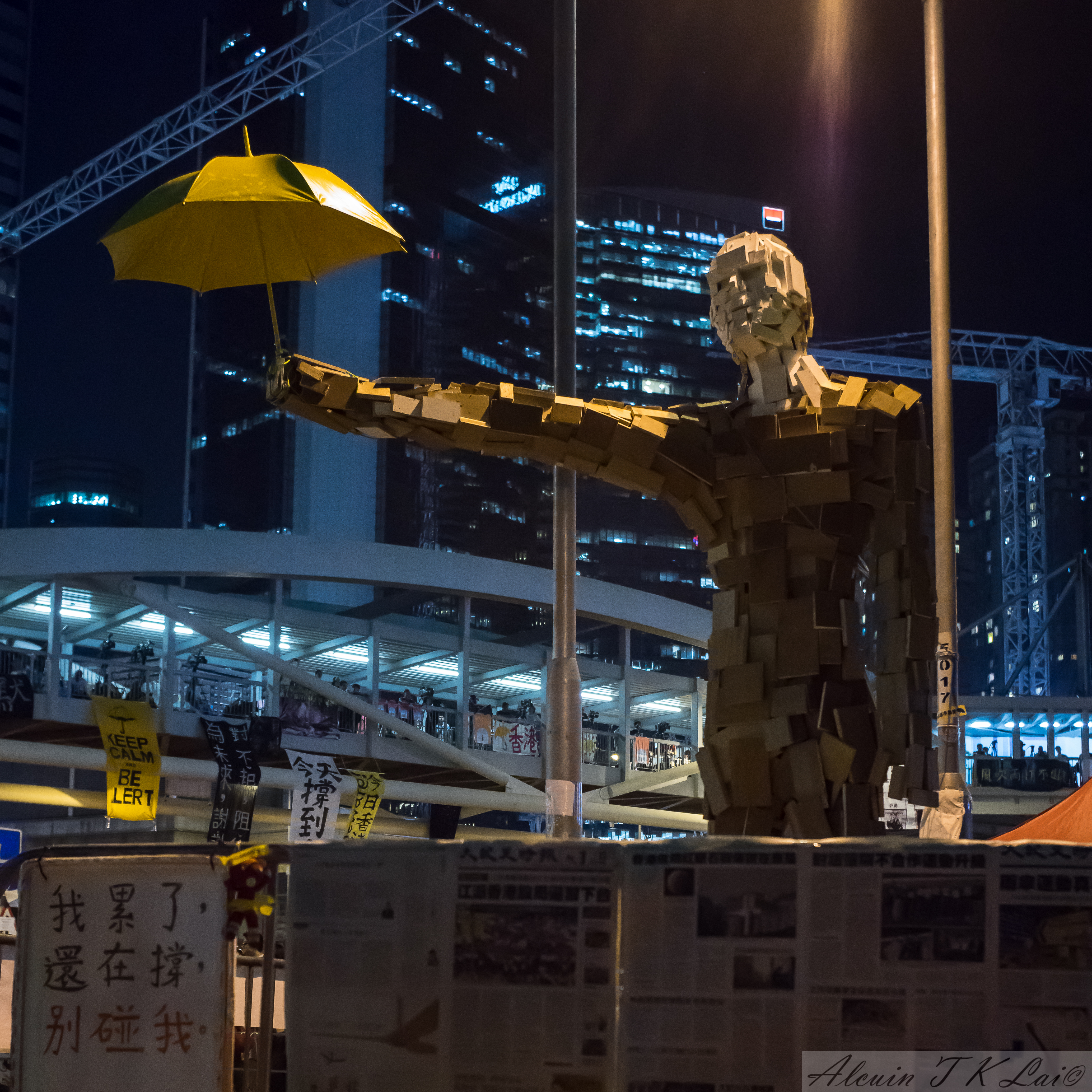 Umbrella Revolution Sculpture in Admiralty